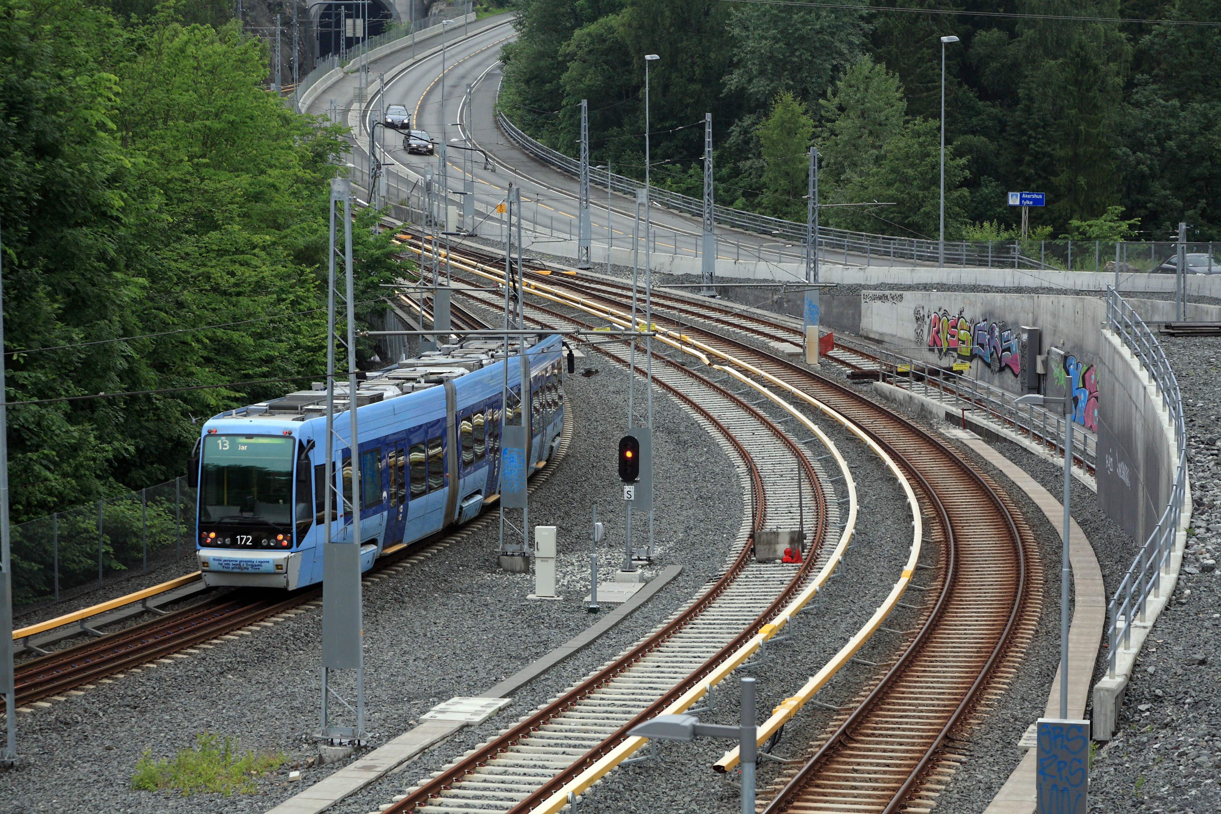 Gelenkwagen der Reihe SL95 auf Fahrt nach Jar. Das Überwerfungsbauwerk ist noch nicht in Betrieb, echter Mischbetrieb wird zur Zeit nicht durchgeführt. Die Züge der Linie 13 benutzen in beiden Richtungen das linke, die der Linie 2 das rechte Gleis.